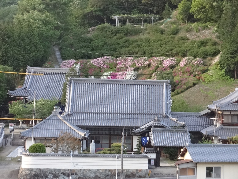 向かいの坂道から見た朝日寺